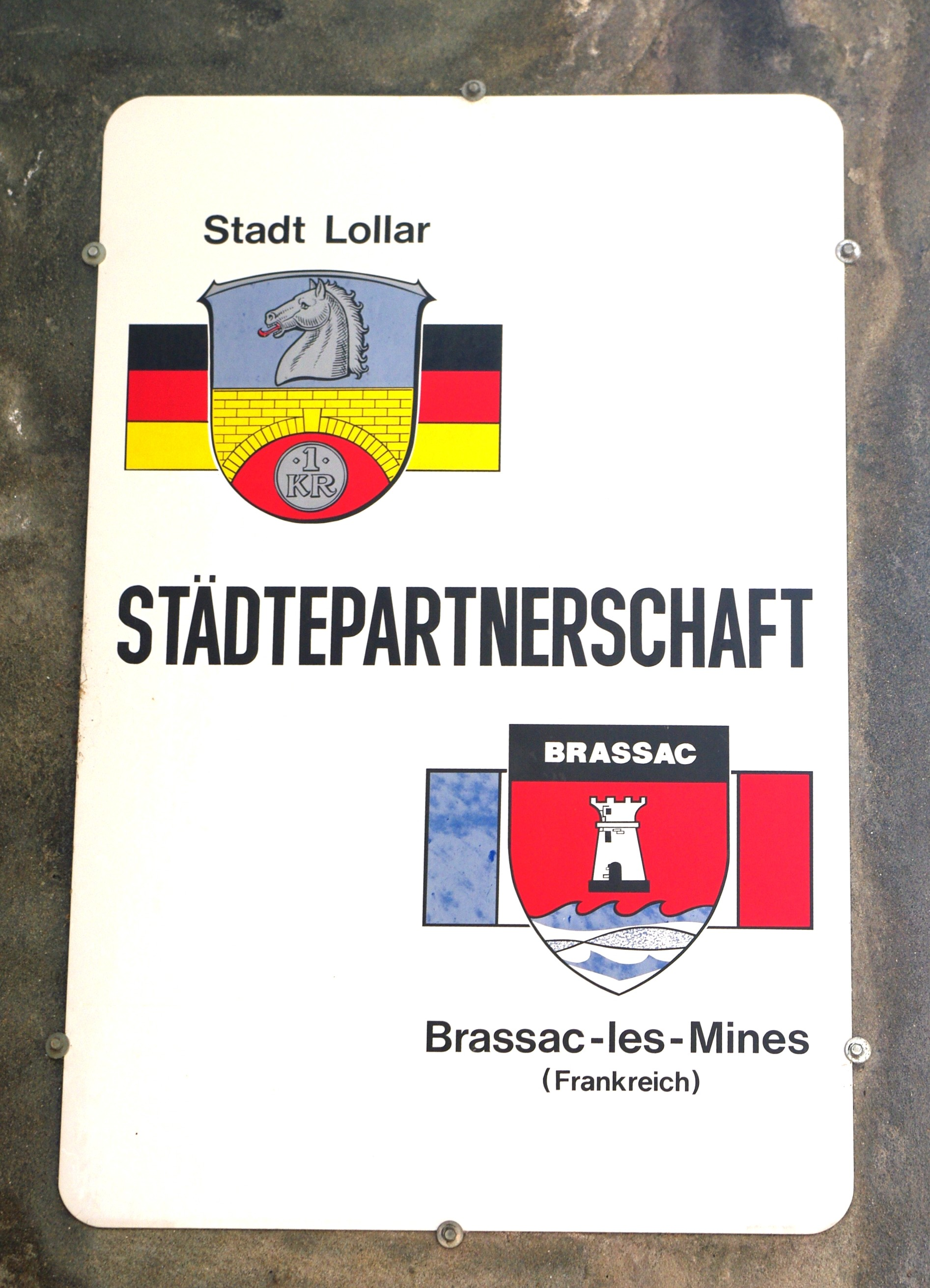 Plaque signalant le jumelage entre la ville de Lollar (Allemagne) et de Brassac-les-Mines (Puy-de-Dôme) sur un mur de la maison du peuple de Brassac.